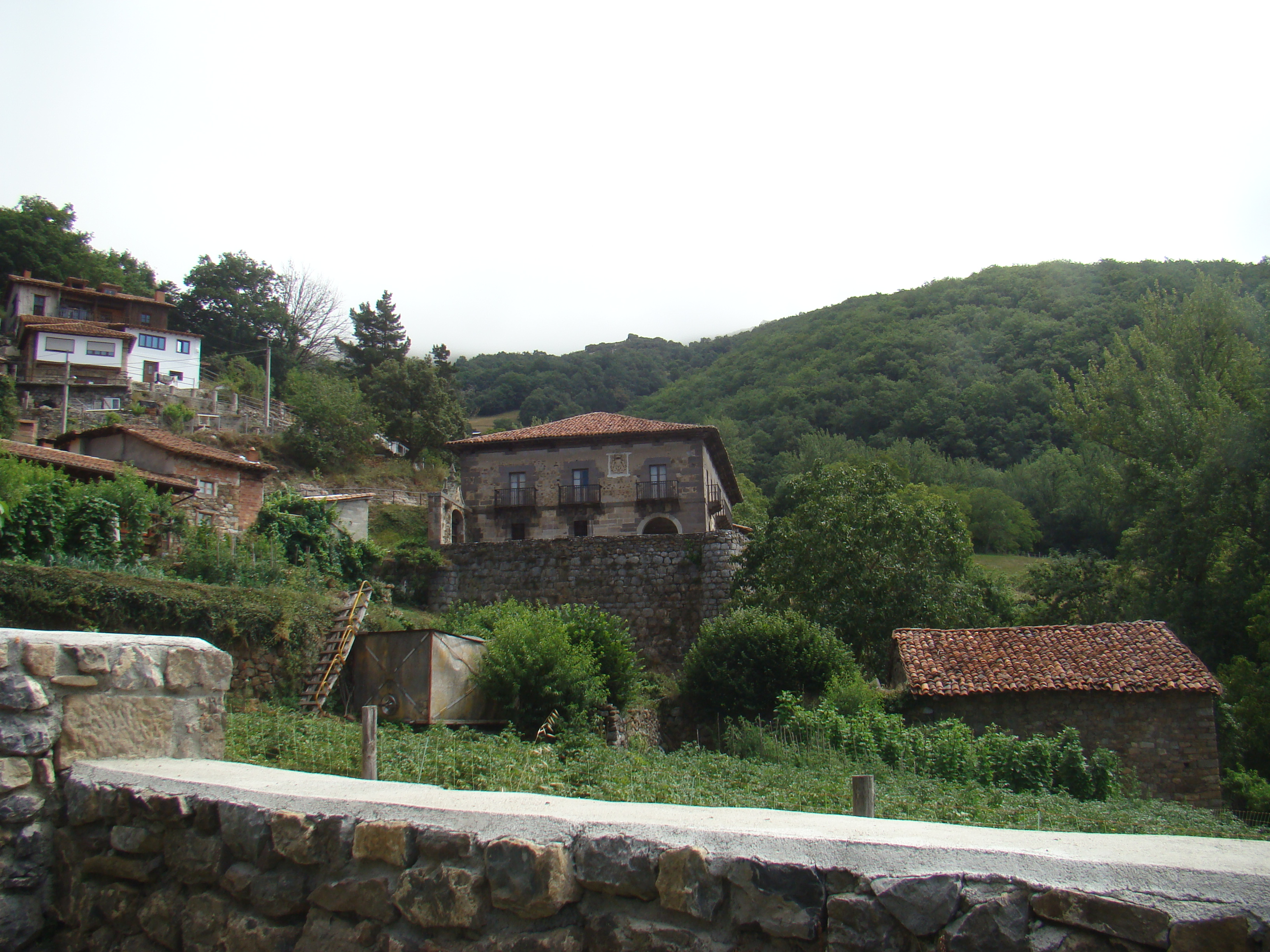 Salarzón es una localidad del municipio de Cillorigo de Liébana, en la comarca de Liébana (Cantabria, España). Casa palacio de la familia Gómez de la Cortina mandada construir por el conde de la Cortina Vicente Gómez de la Cortina y Salceda.